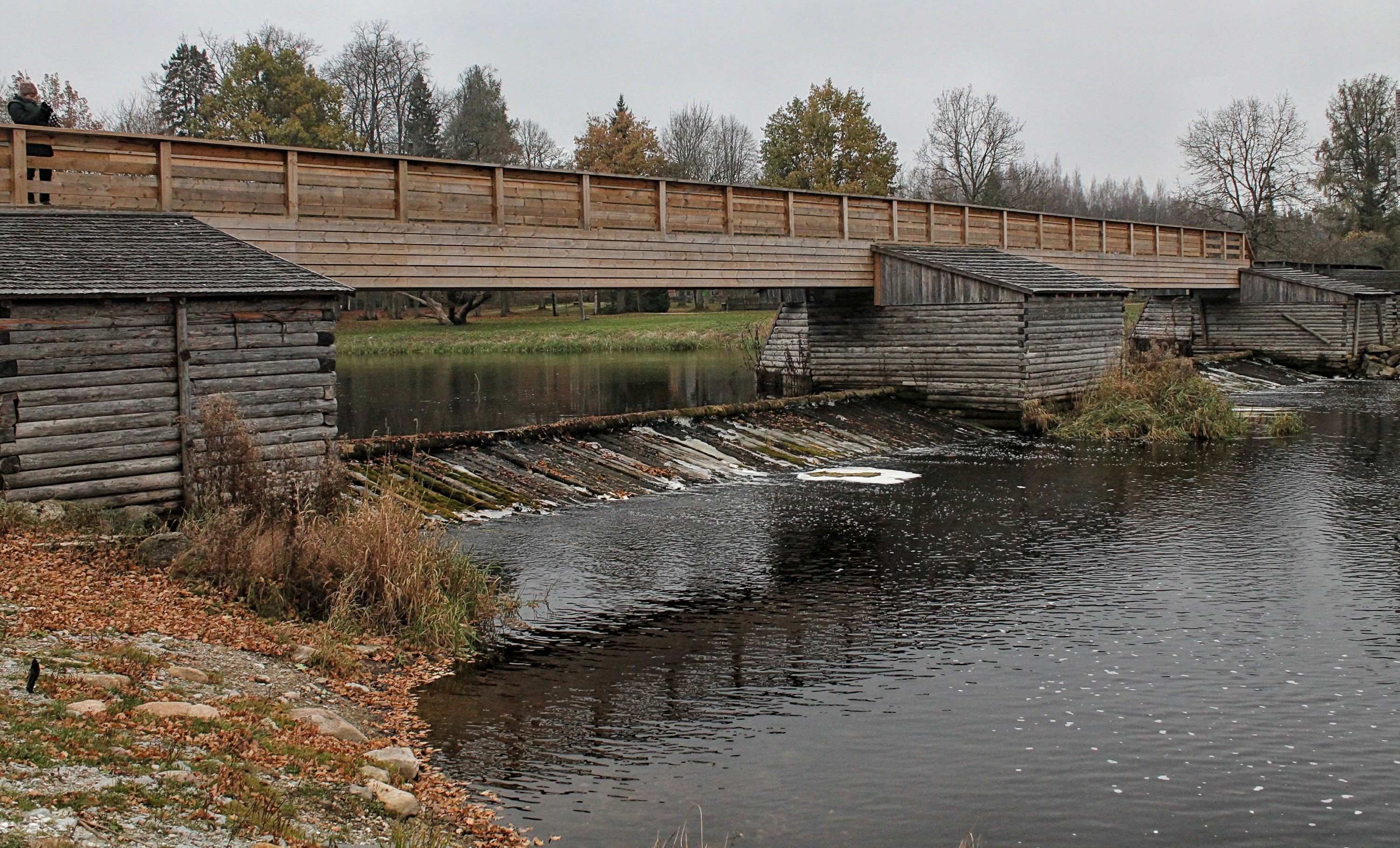 Üle selle silla jõuab Carl Robert Jakobsoni talumuuseumini